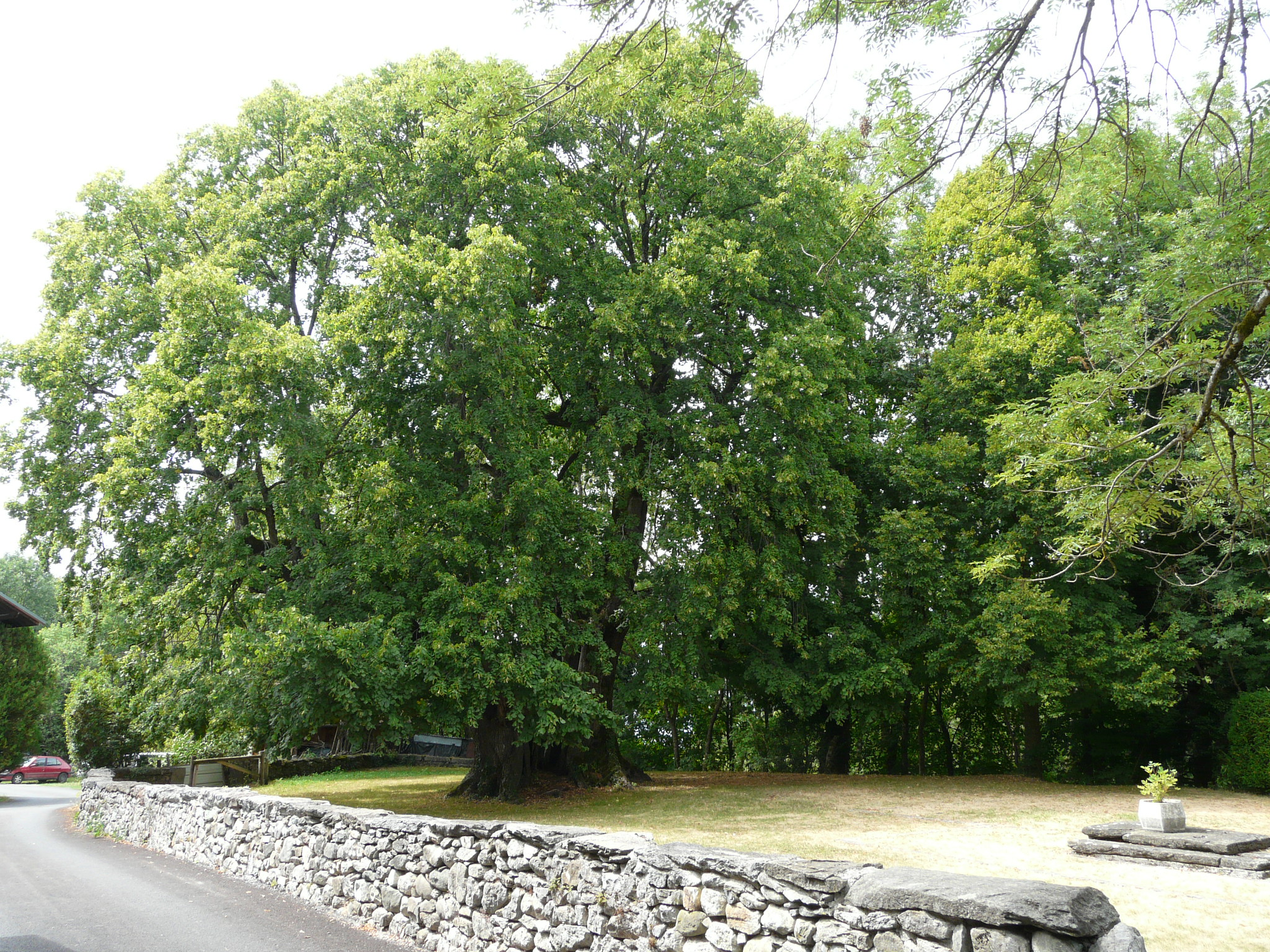 Le tilleul "Henri IV" à Chaâteauvieux (Féternes, Haute-Savoie)